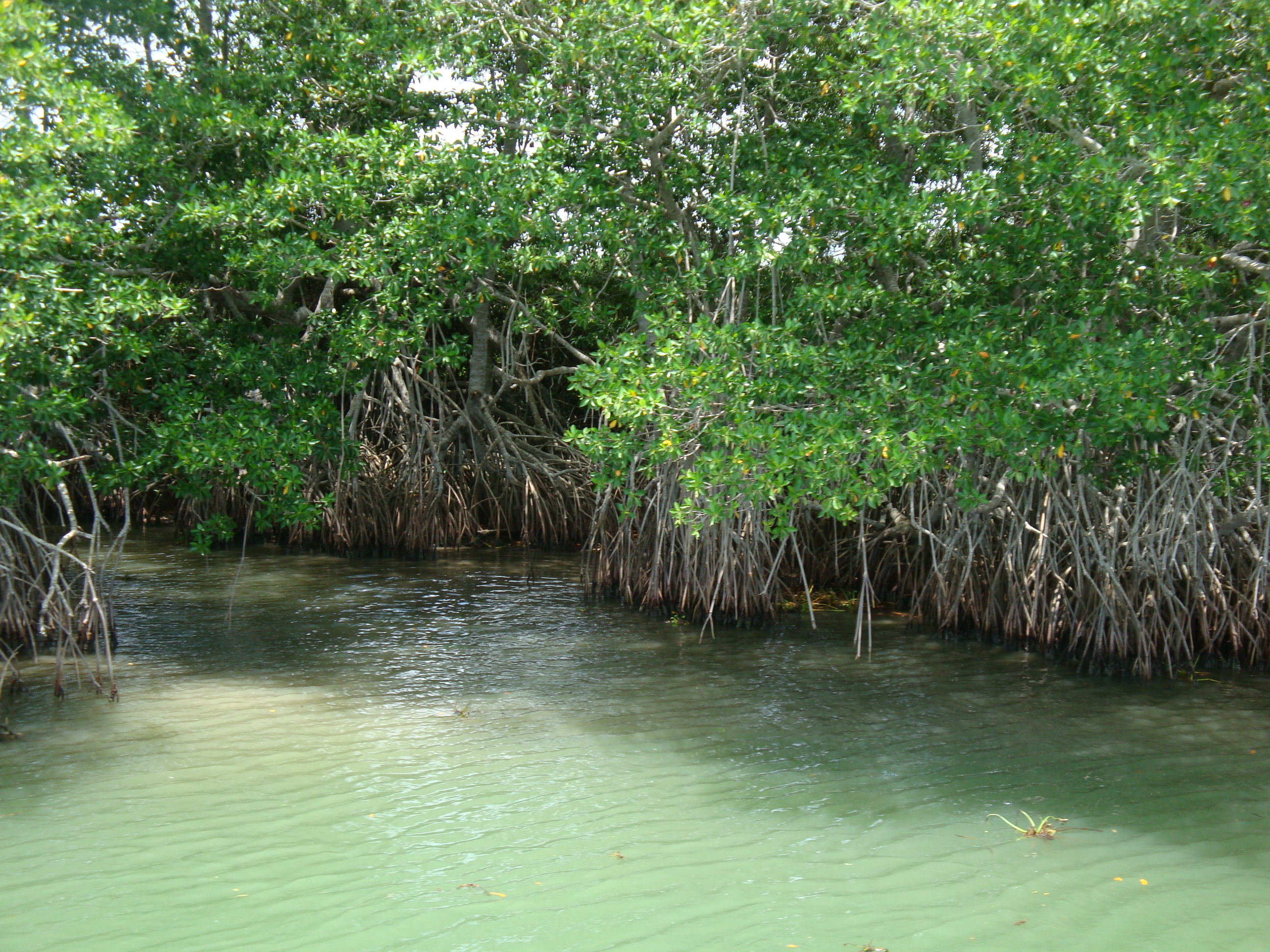 Canales en la Reserva de la Biosfera "Pantanos de Centla", municipio de Centla, Tabasco, México.